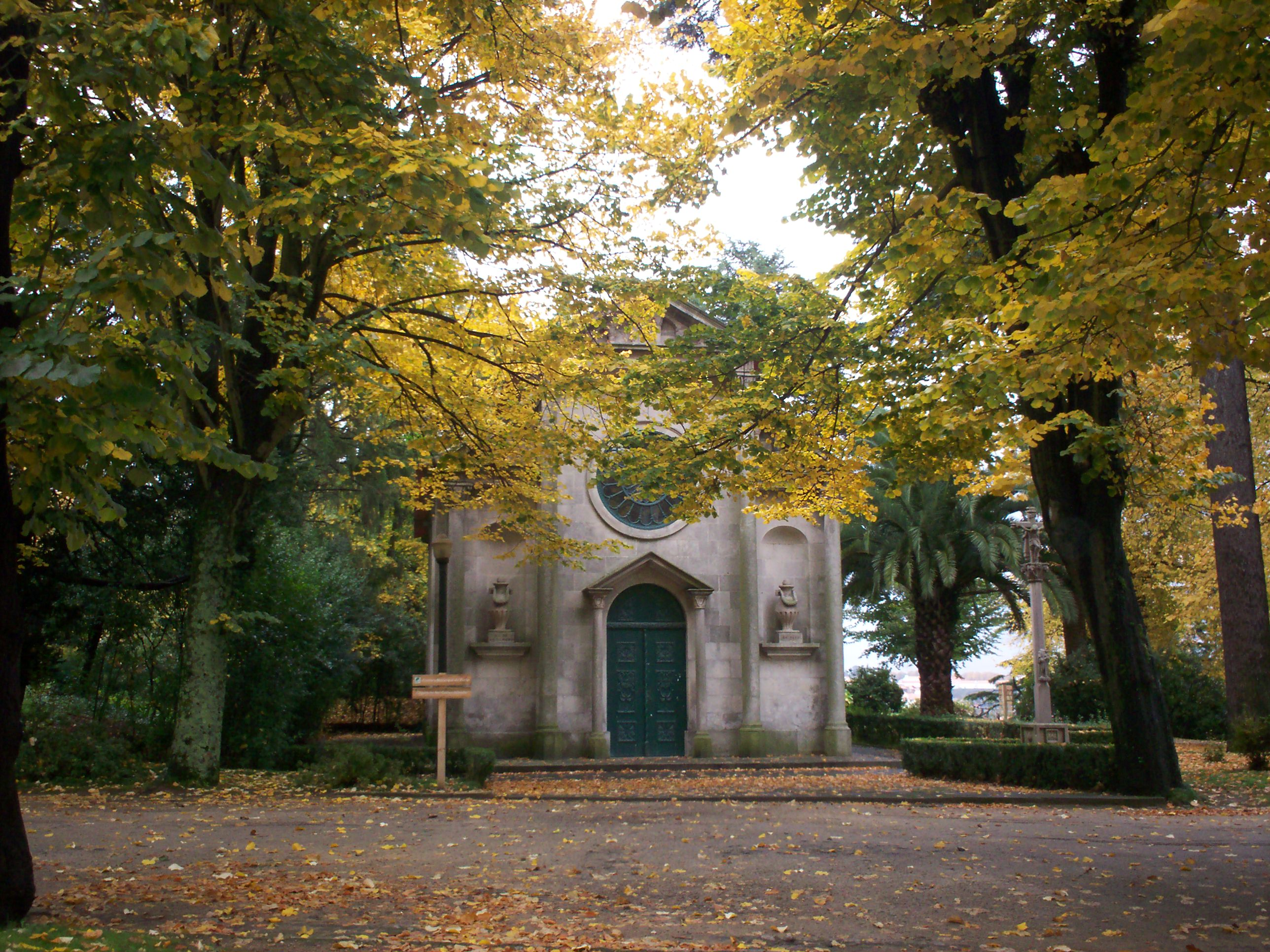 Capela de Carlos Alberto da Sardenha / Capela de São Carlos Borromeu nos jardins do Palácio de Cristal no Porto, Portugal.